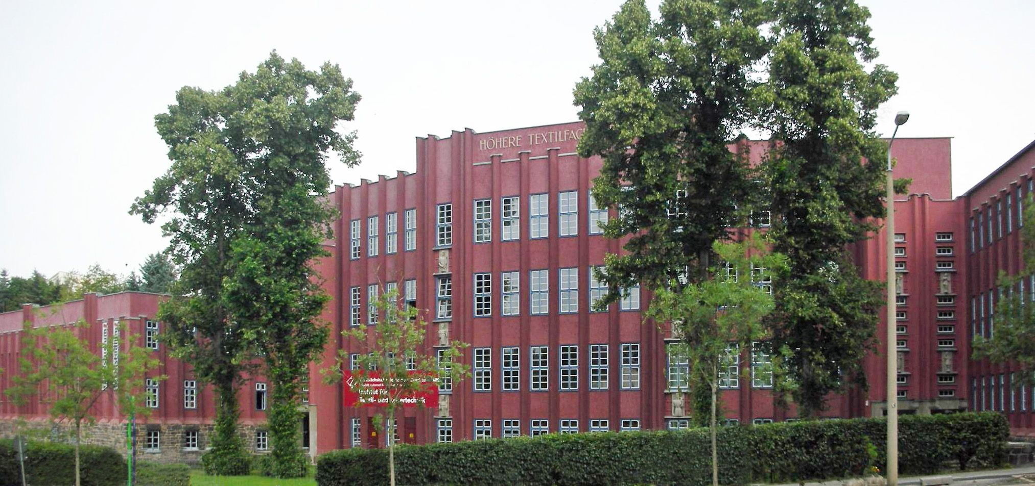 Textilschule in Reichenbach (Vogtland) (Institut für Textil- und Ledertechnik (ITL) und Fakultät Architektur der Westsächsischen Hochschule Zwickau), erbaut 1927 als Höhere Textilfachschule nach Entwurf von Stadtbaumeister Rudolf Ladewig